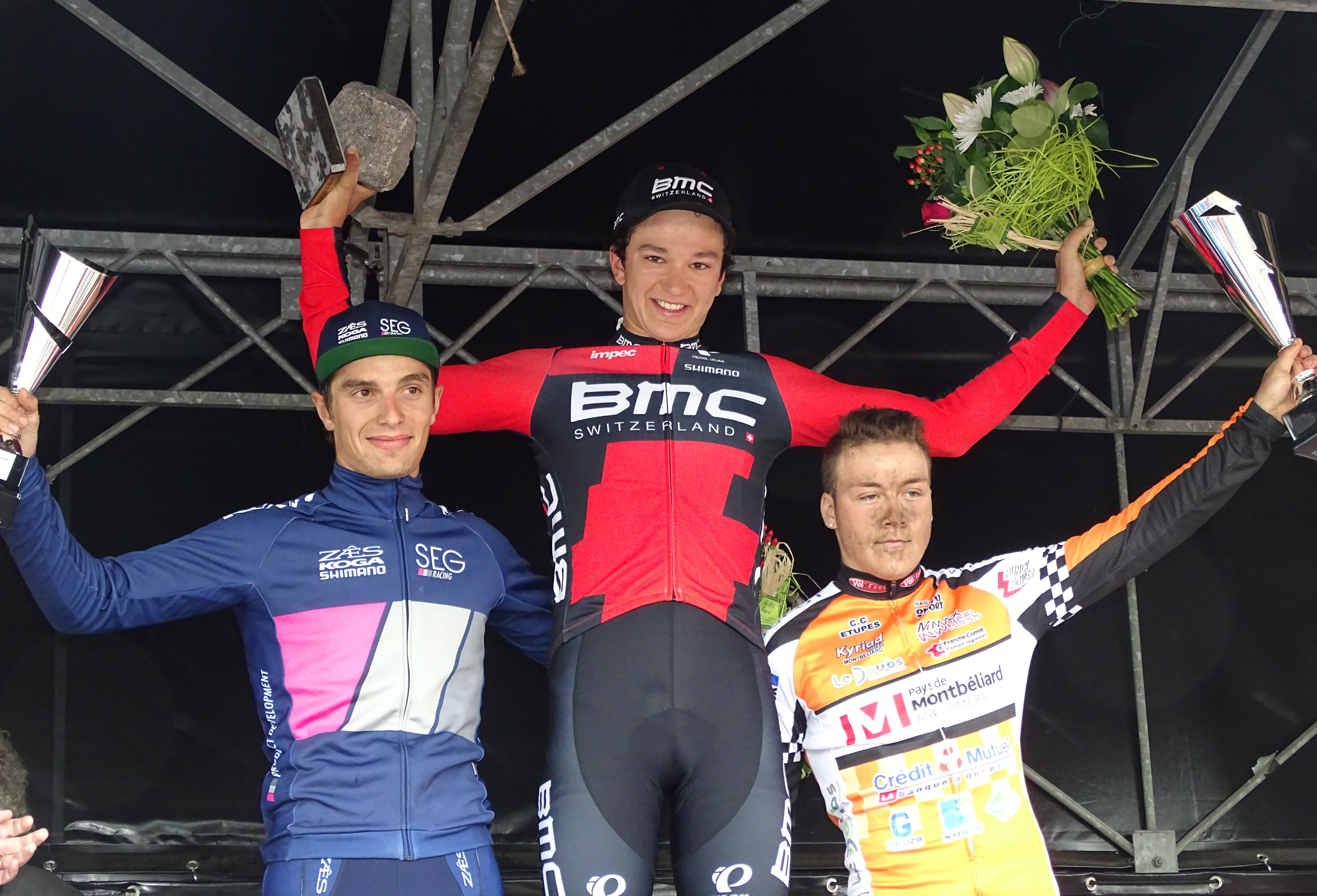 Reportage réalisé le dimanche 31 mai à l'occasion de l'arrivée du Paris-Roubaix espoirs 2015 au vélodrome André-Pétrieux à Roubaix, Nord, Nord-Pas-de-Calais, France.